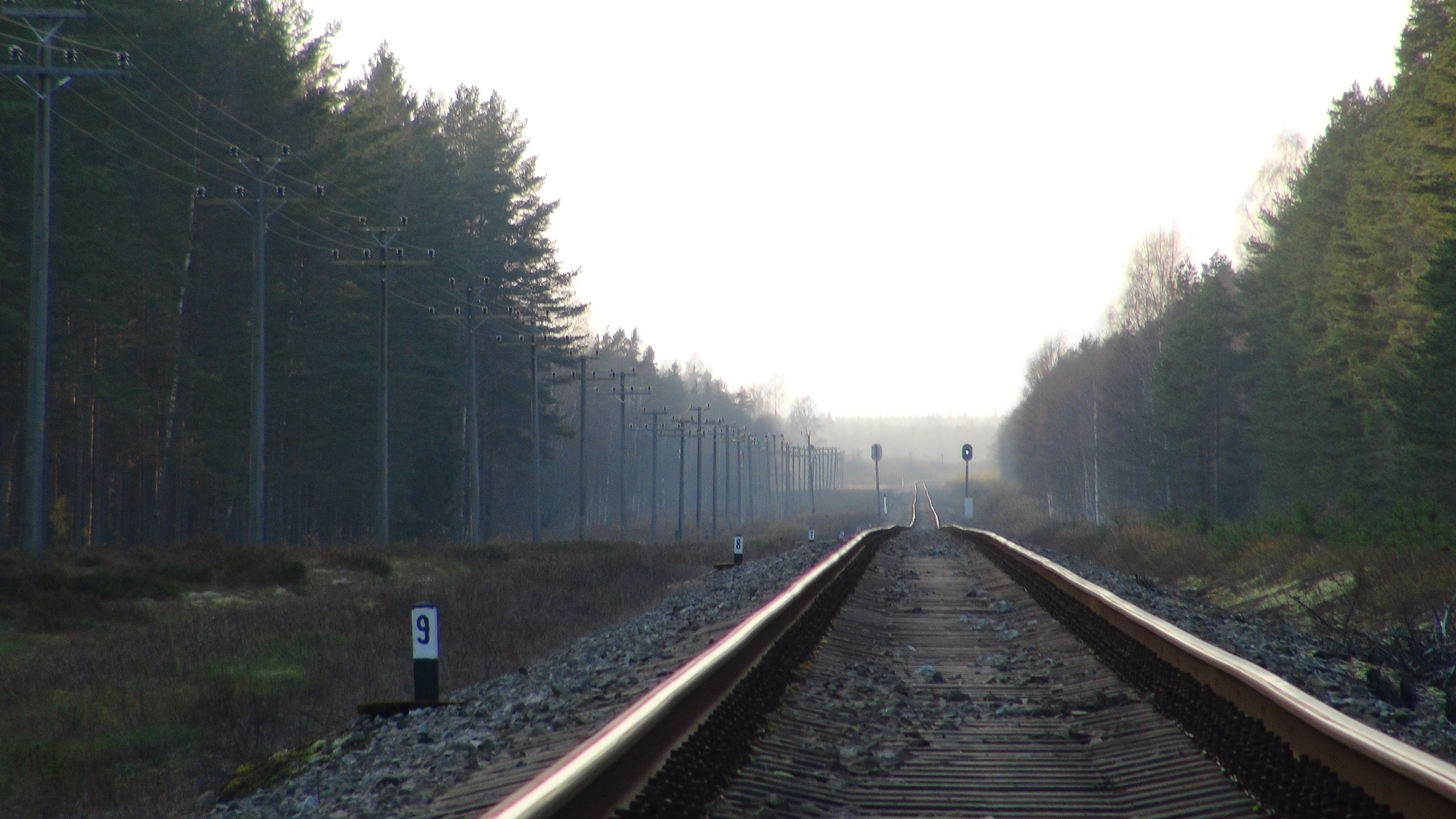 Raudtee Juba külas